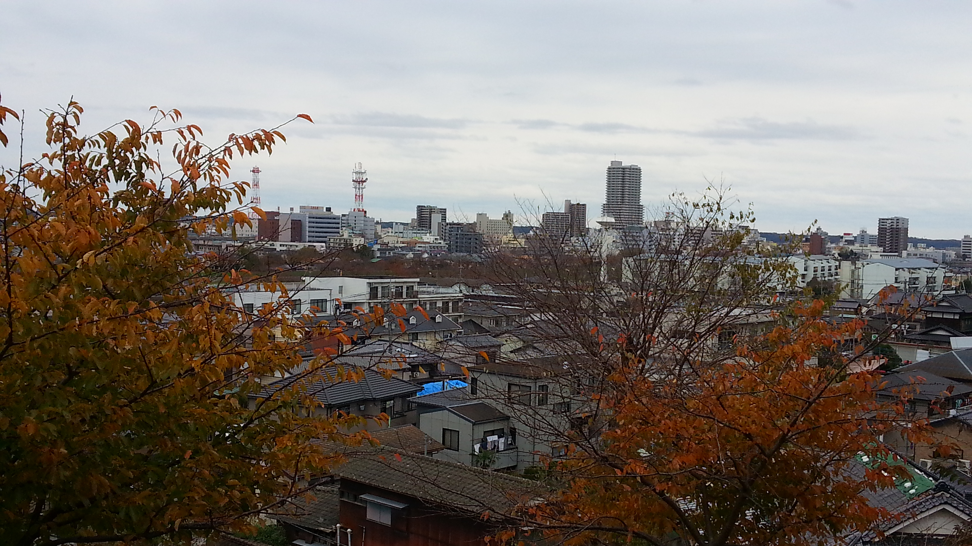 常福寺より撮影